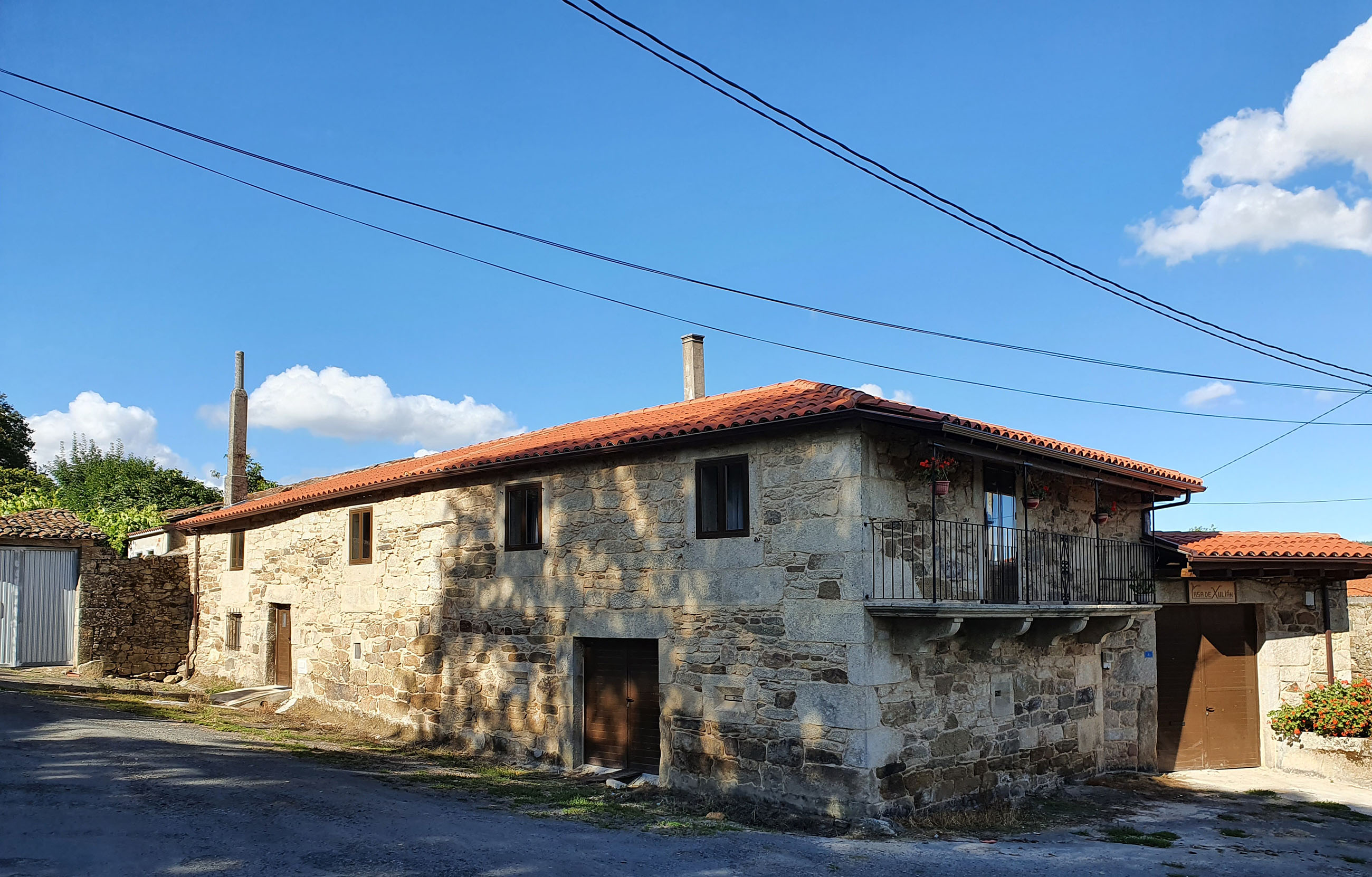 Lugar de Sandolfe, na parroquia monterrosina de Arada. Cómpre volver lembrar aquí, á luz desta imaxe, que a contaminación non soamente convive canda nós por mor dos resíduos; pois tamén existe nas marañas de cables que, sendo necesarios para as comunicacións e iluminación, tamén podían deseñarse camiños para eles que fosen menos agresivos para o medio e para o ollo. Agradecerase cando tal acción aconteza.